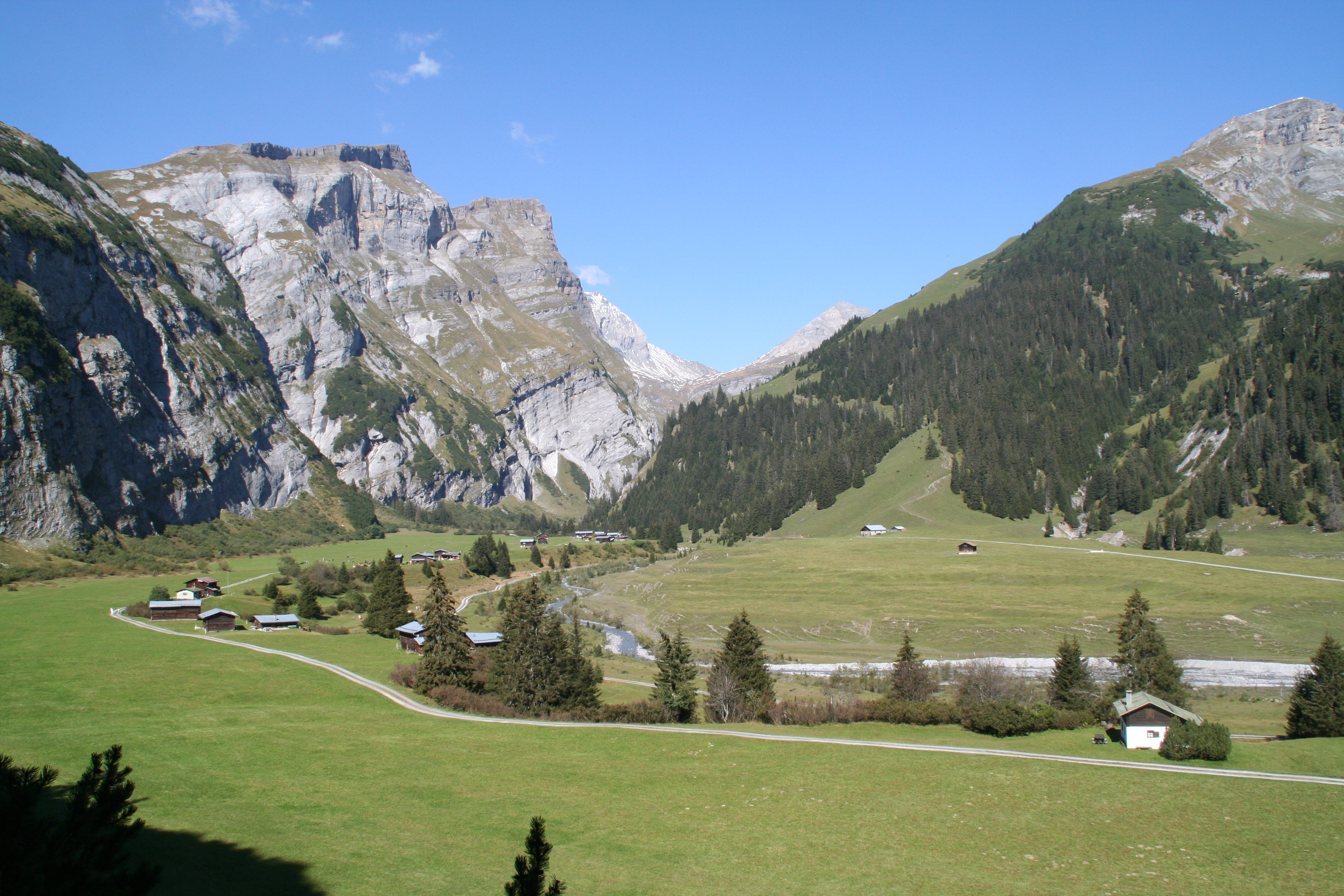 Bargis Ebene von Bargis